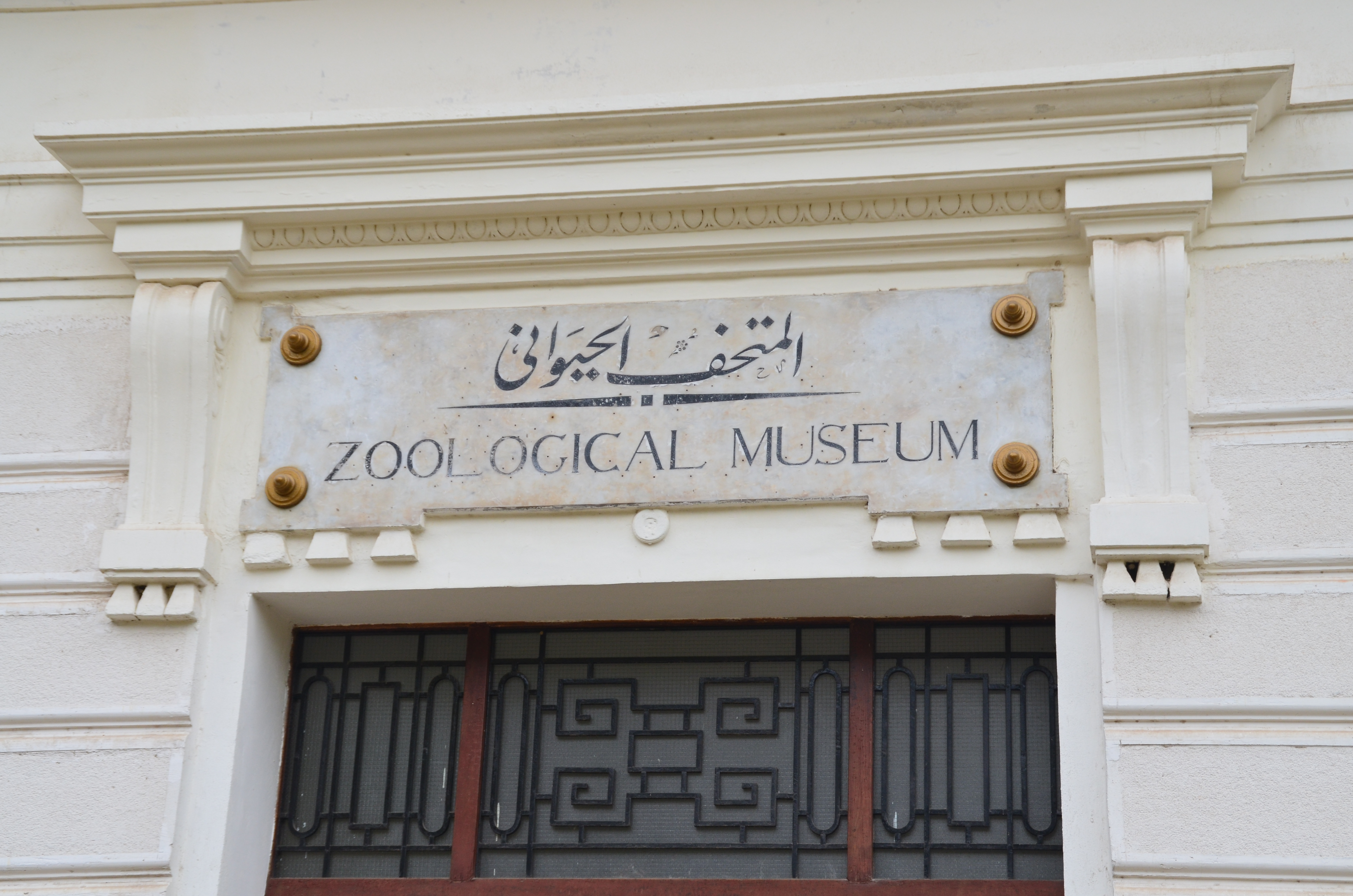 المتحف الحيواني بحديقة حيوان الجيزة